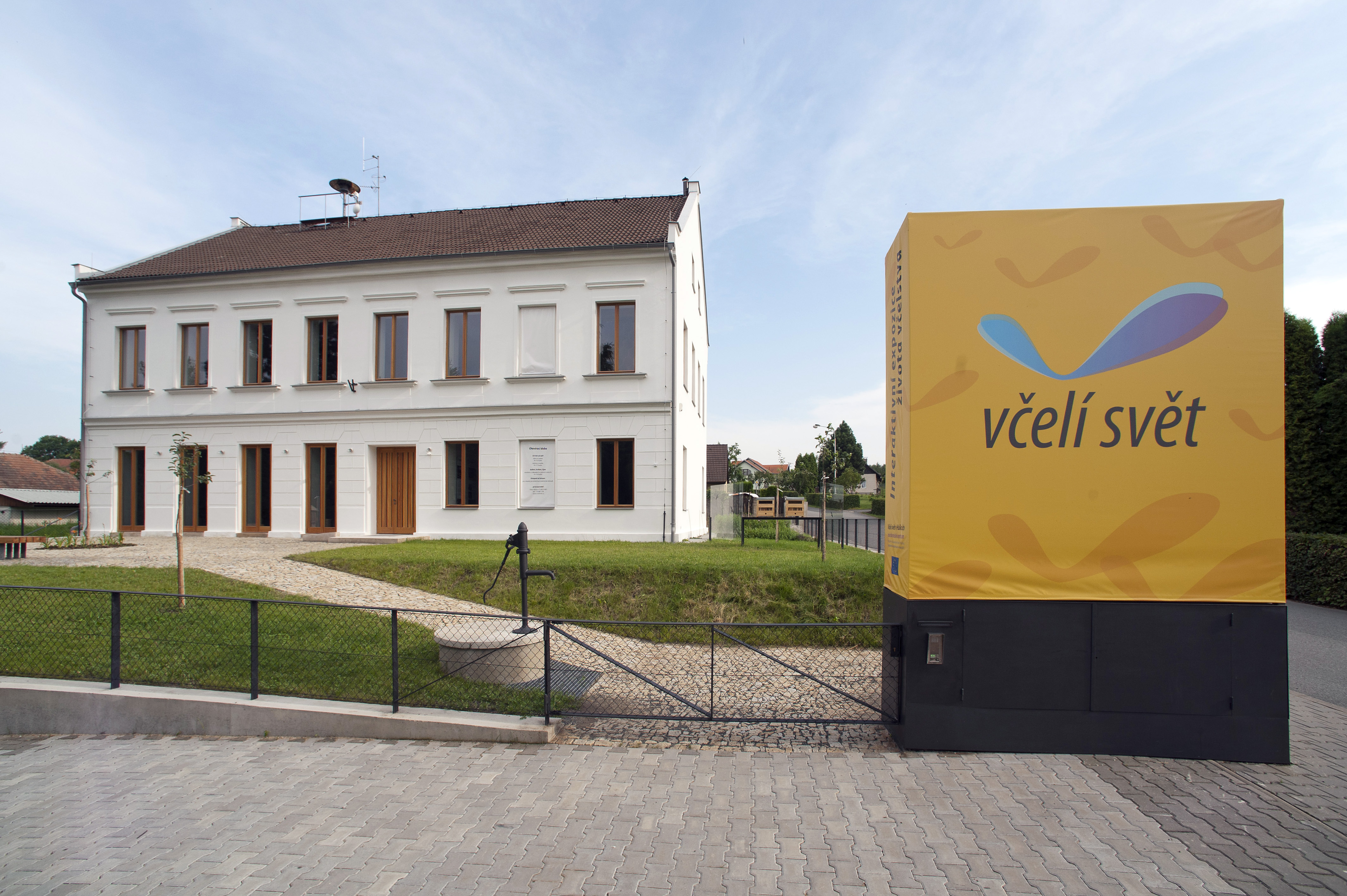 Včelí svět - boční pohled